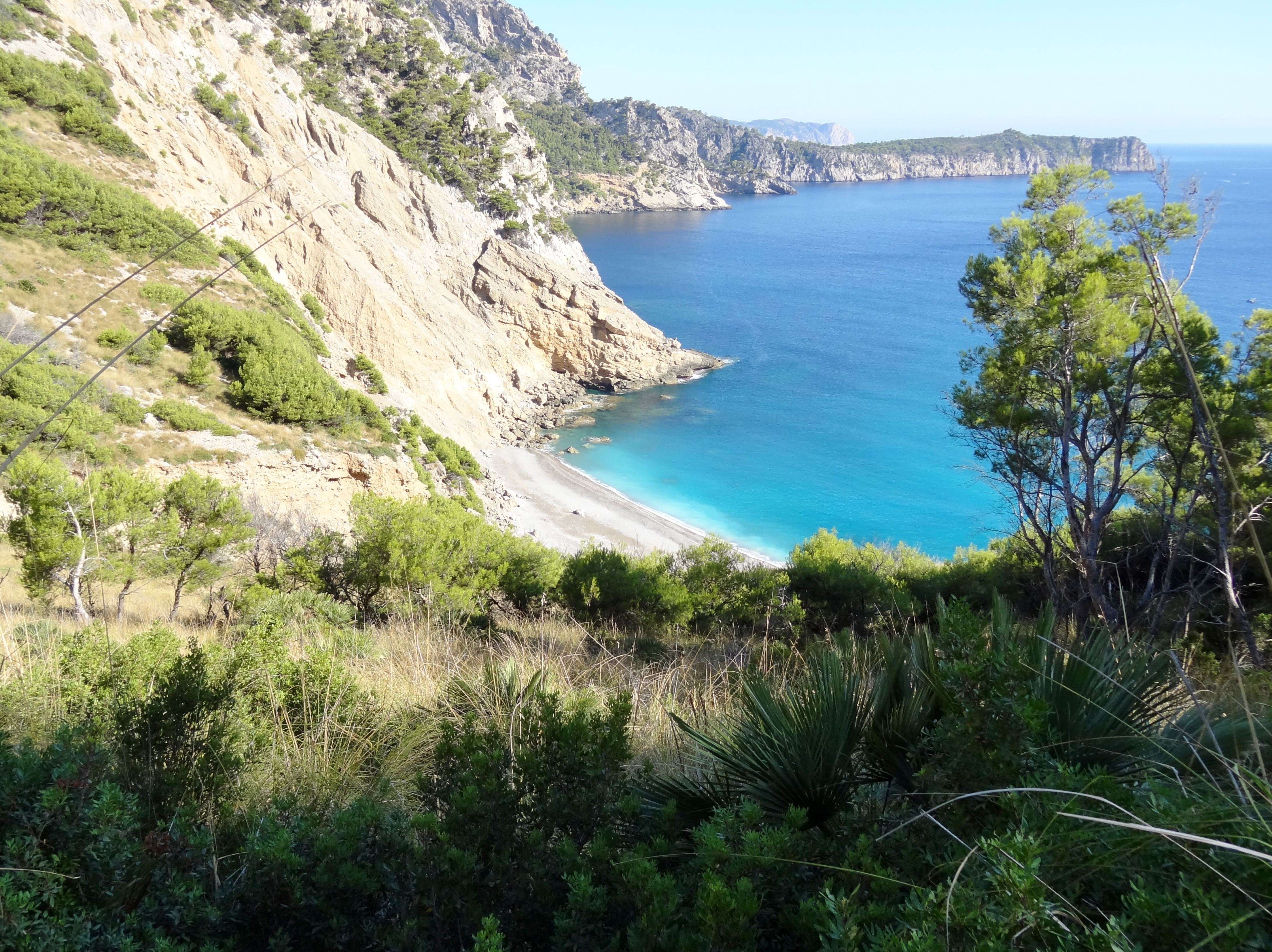 Platja des Coll Baix, Strand auf der Halbinsel Victòria in der Gemeinde Alcúdia, Mallorca, Spanien